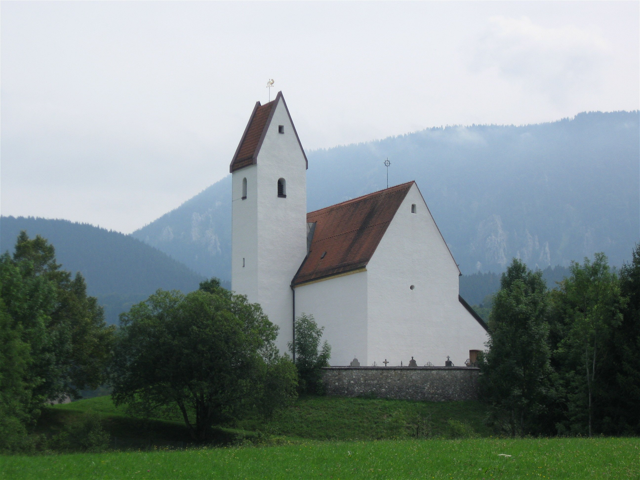 Grainbach; Kath. Filialkirche St. Ägidius und Nikolaus, im Kern spätromanischer Bau, 13. Jh., Chor und Turm Ende 15. Jh., Inneres im 18. Jh. barockisiert; mit Ausstattung.